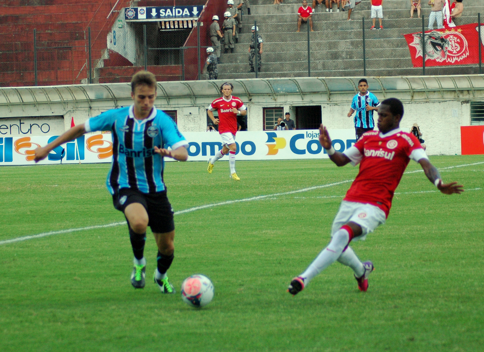 Bressan e Fred na disputa